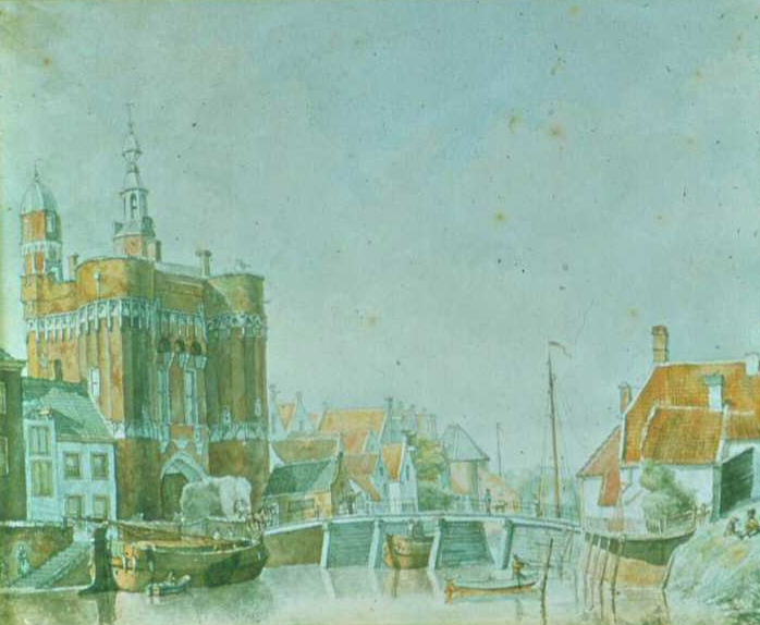 Bewerking van een dia van een aquarel. Afkomstig van de site van Historisch Centrum Overijssel. De beschrijving aldaar: Documentidentificatienummer:DIA05933-C022 1 dia van tekening : kleur; Locatie: Zwolle, O;, Badhuiswal;; Beschrijving van de voorstelling: Aquarel door A. Oltmans uit 1834 naar P. Beretta. Diezerpoort voor de afbraak in 1829. Collectie Stedelijk Museum Zwolle. Datering voorstelling: 1829 -1829 Fotograaf: Oltmans, A. Algemene gegevens: Trefwoorden:Collectie Stedelijk Museum Zwolle;Verdedigingswerken;Bruggen (Zwolle);Diezerpoort; Literatuur: Auteursrechthouder:Stedelijk Museum Zwolle, Melkmarkt 41, Zwolle, O;. Noot: nu dus publiek domein, omdat het hier een technische foto betreft van een werk dat in het publiek domein valt. Zie ook overleg.